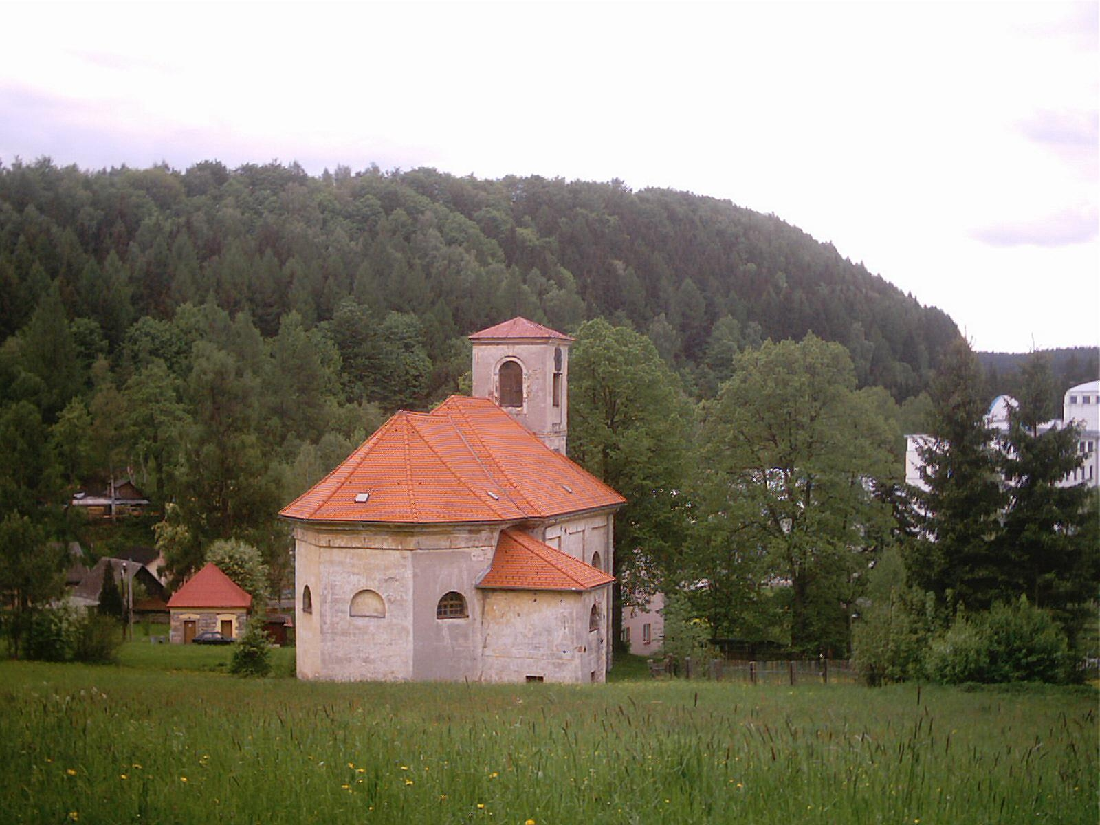 The image shows a village church (Kostel Povýšení svatého Kříže (Adršpach)) of village Adršpach (Adrspach) in NE Bohemia (Europe, Czech Republic). Author is Vladimíra Kosičková (Vladimira Kosickova).